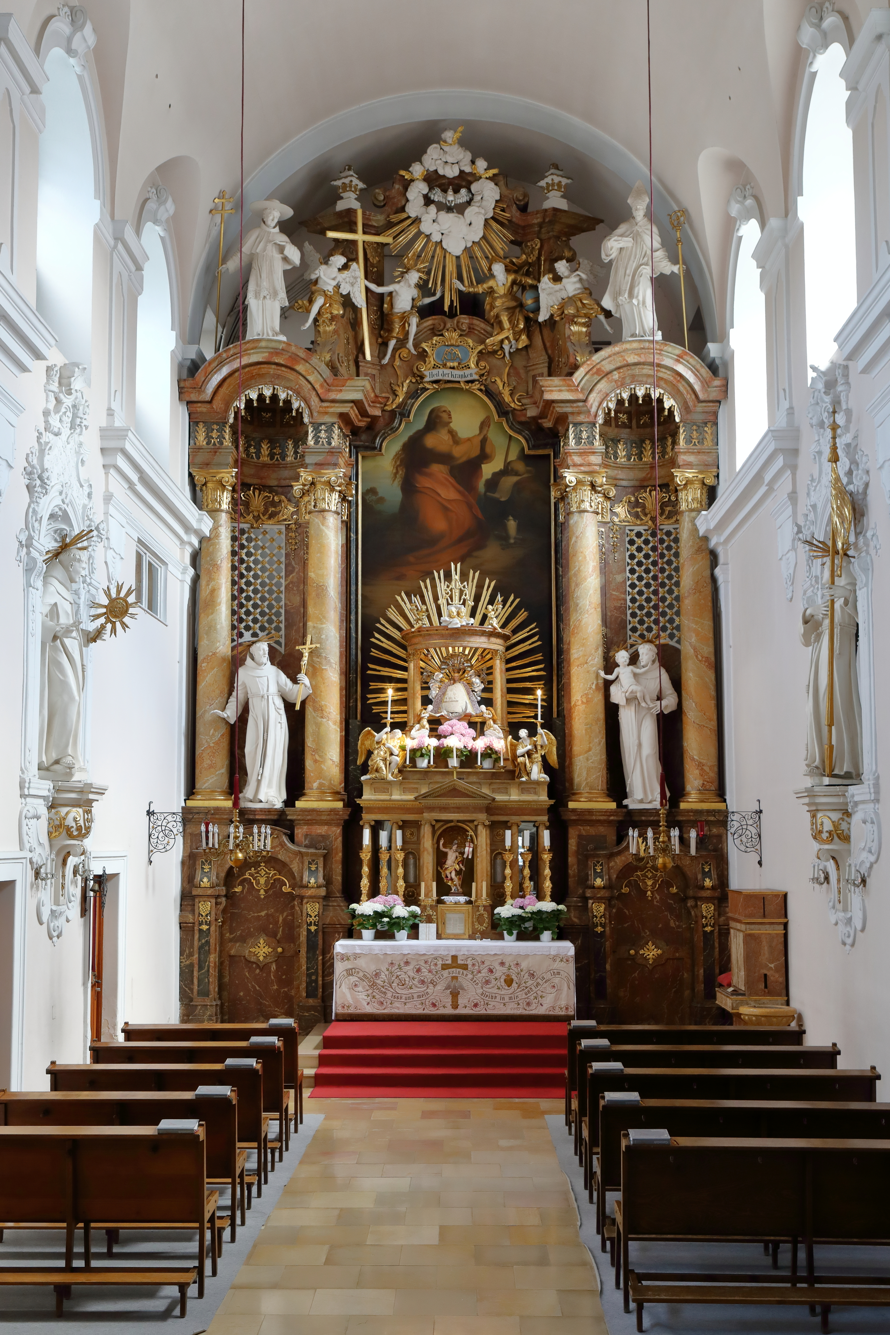 Hochaltar der Franziskanerkloster- und Wallfahrts- sowie ehemalige Pfarrkirche hll. Maria Magdalena und Maria in der niederösterreichischen Marktgemeinde Maria Enzersdorf.Ein monumentaler, dreiachsiger Wandaltar aus dem 18 Jahrhundert, der die gesamte Ostwand des Chorraumes (Presbyterium) einnimmt. Das Altarbild „hl. Maria Magdalena“ malte 1854 Josef Kessler nach einem Entwurf von Leopold Kupelwieser.